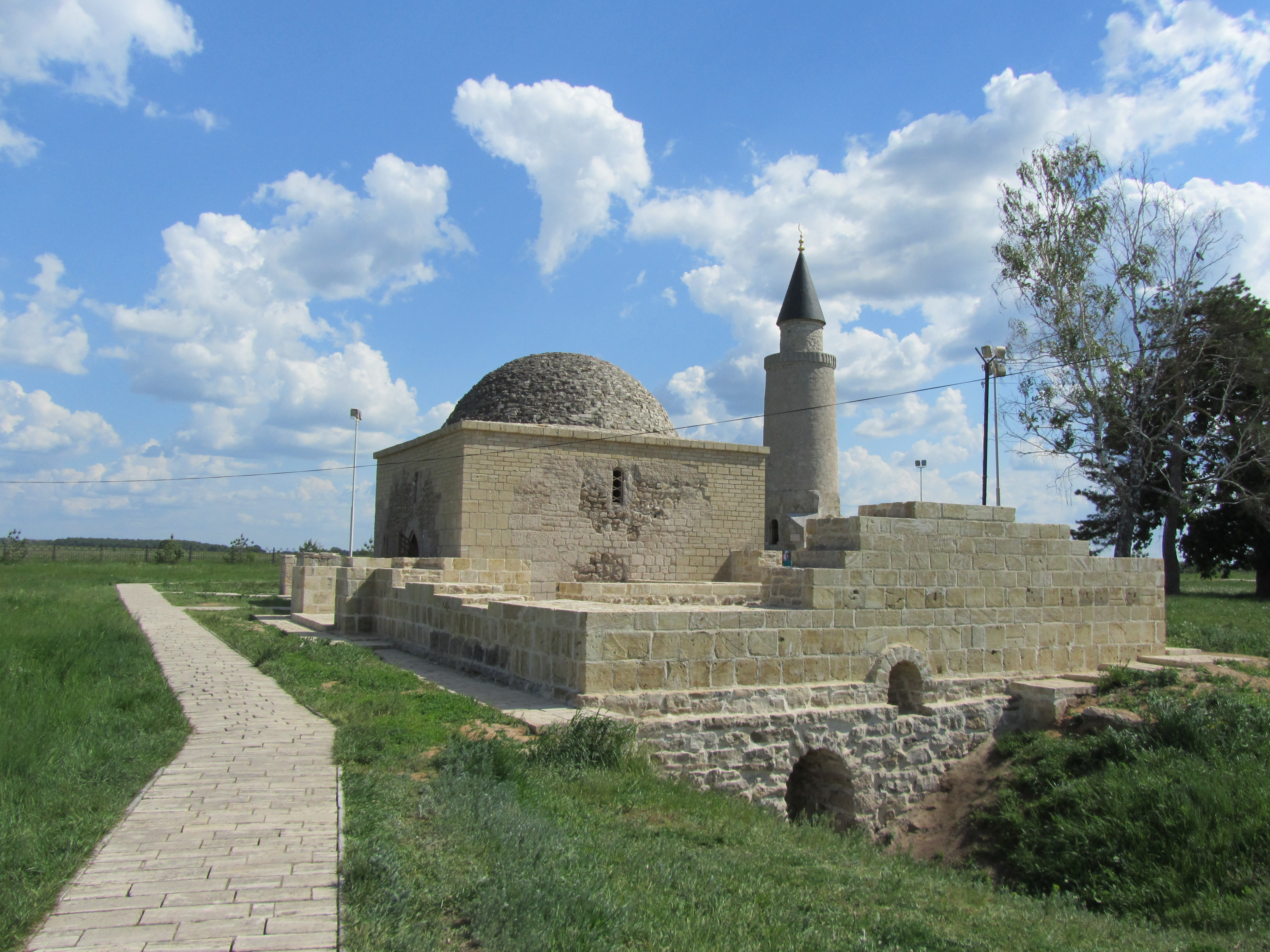 Комплекс памятников архитектуры XIII-XIV вв. на территории Булгарского городища (архитектурный комплекс «Болгары») (Республика Татарстан, Болгар, село Болгары, городище)